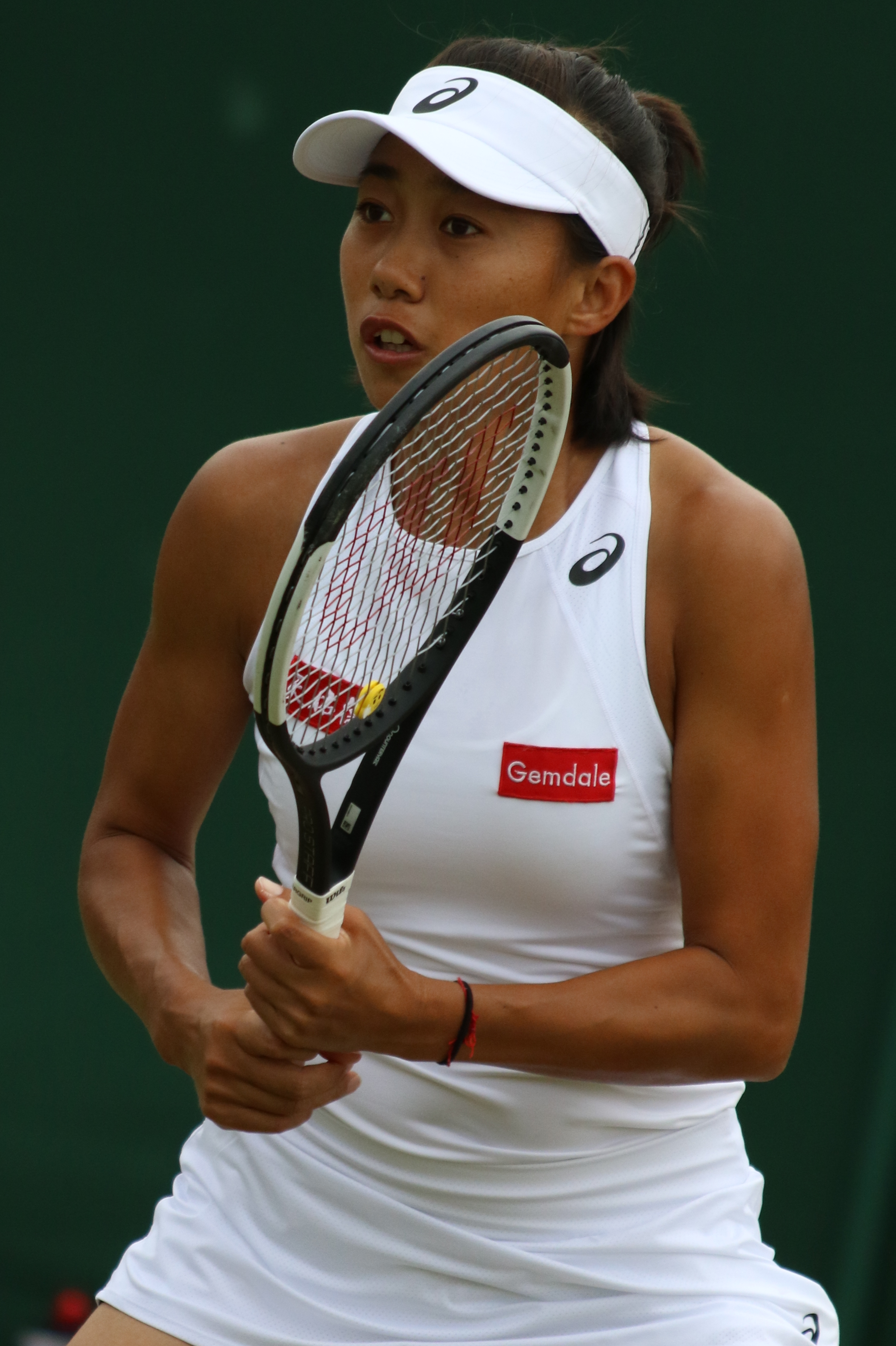 Zhang WM19 (16)